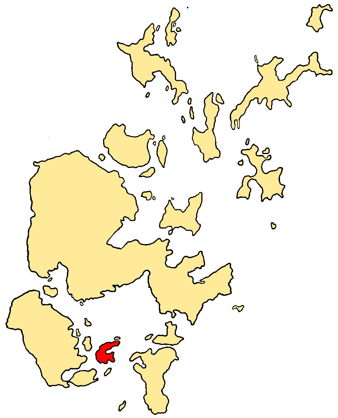 Flotta